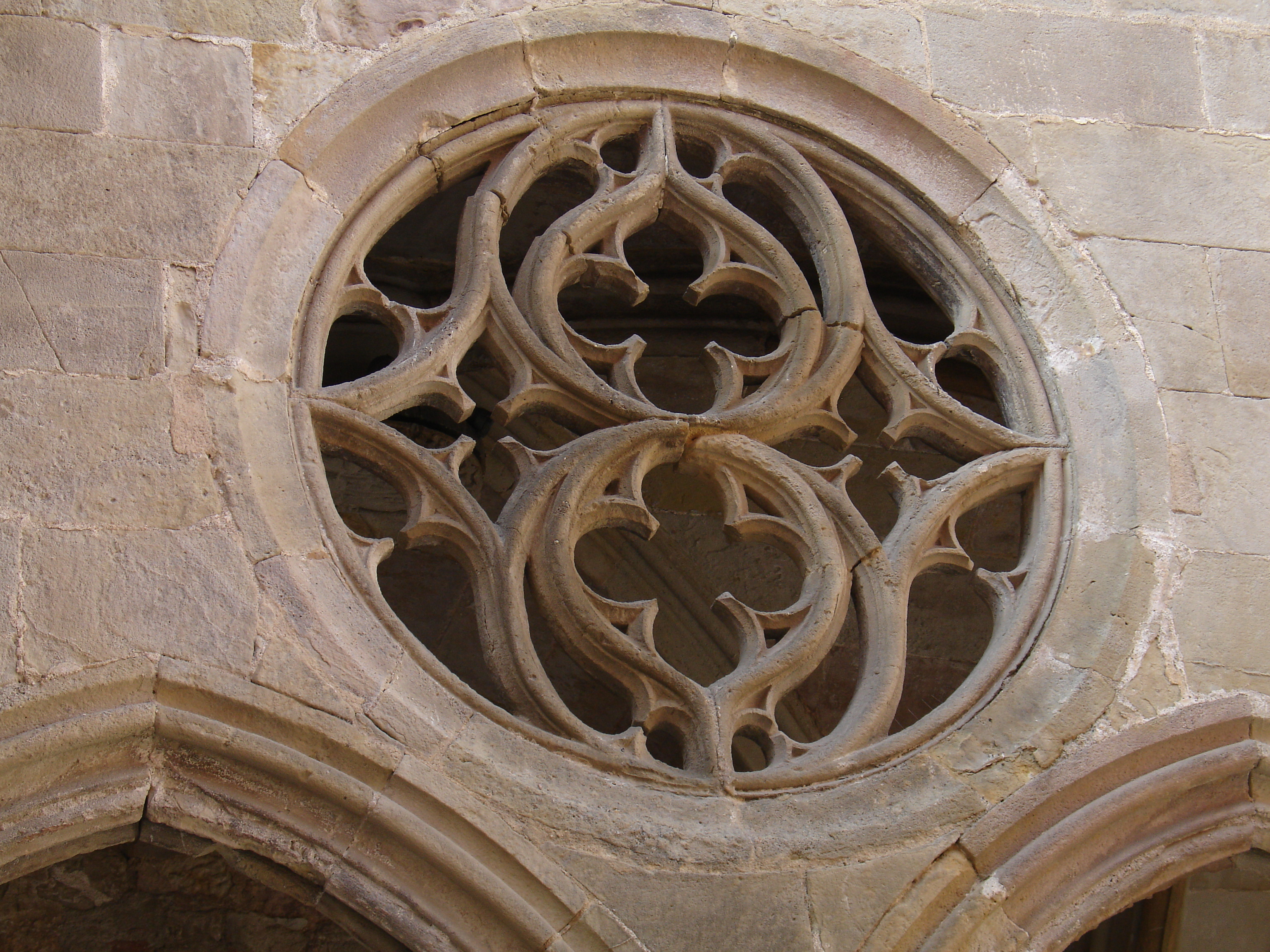 /home/paco/Desktop/Decoració del claustre - Sant Pere de les Puel·les.